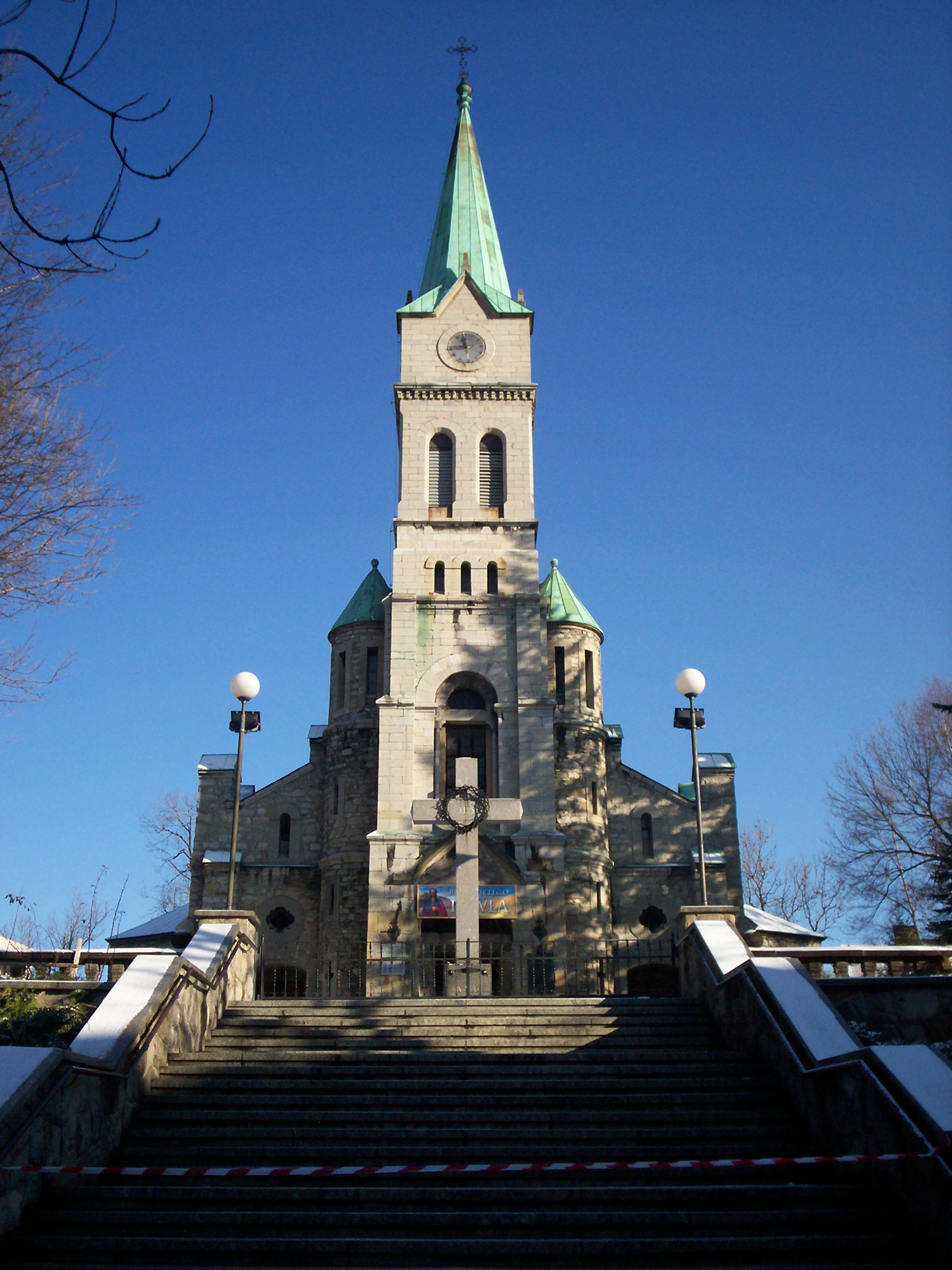 Zakopane, kościół pw. Najświętszej Rodziny.